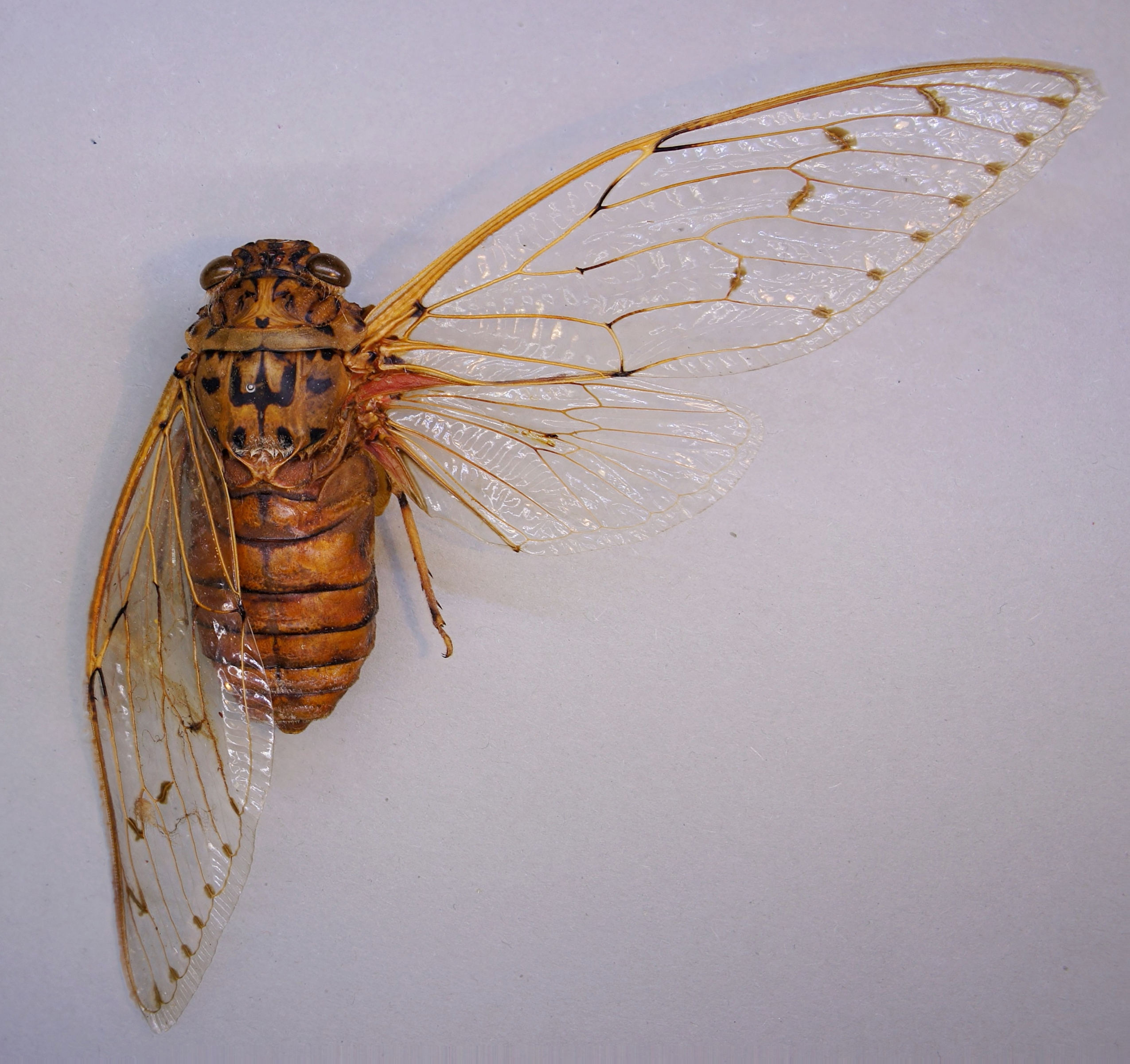 Pomponia imperatoris Herkunft: Süd-Ost Asien